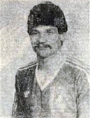 Ryszar Kotala - polski siatkarz